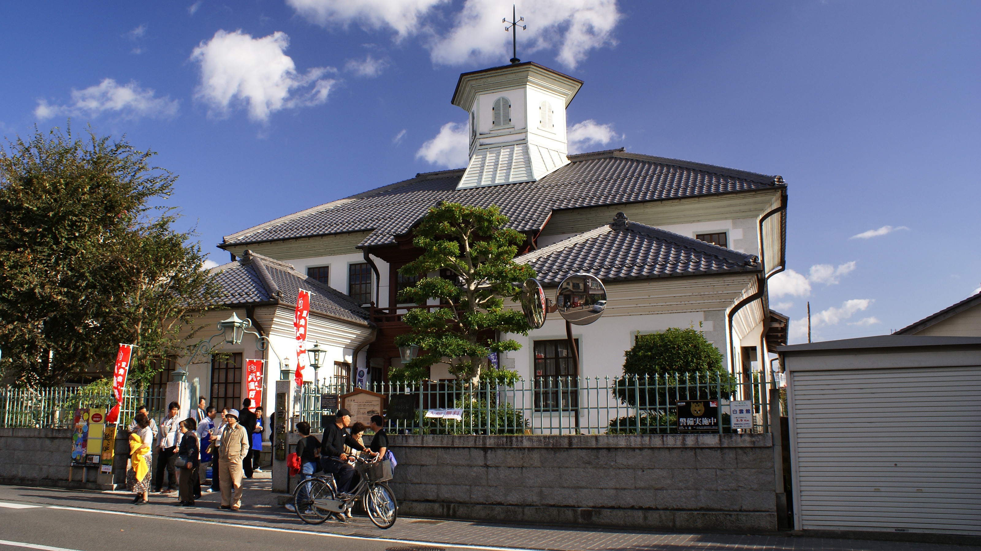 Hakuunkan in Omihachiman, Shiga, Japan